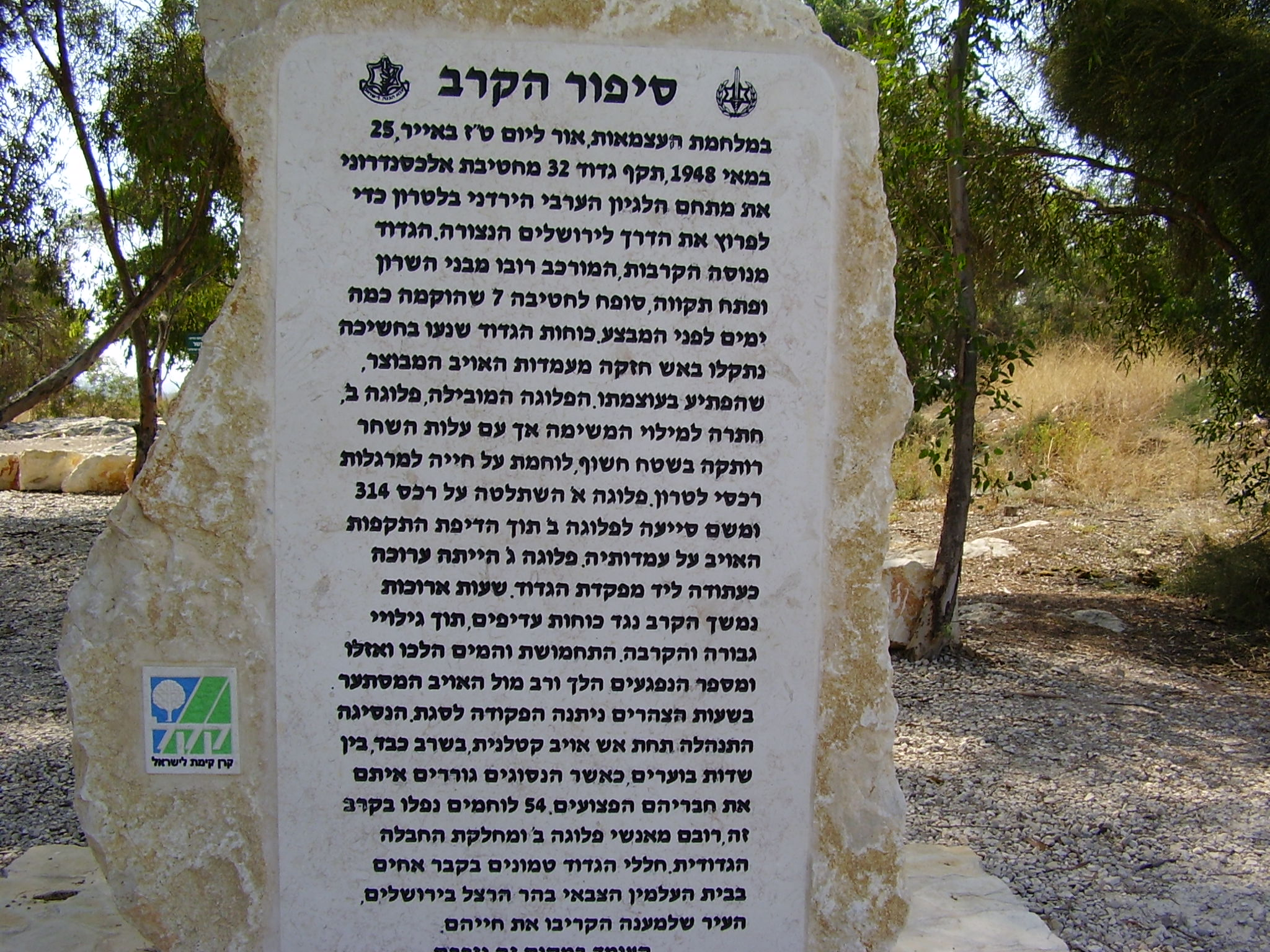 אנדרטת אלכסנדרוני בלטרון